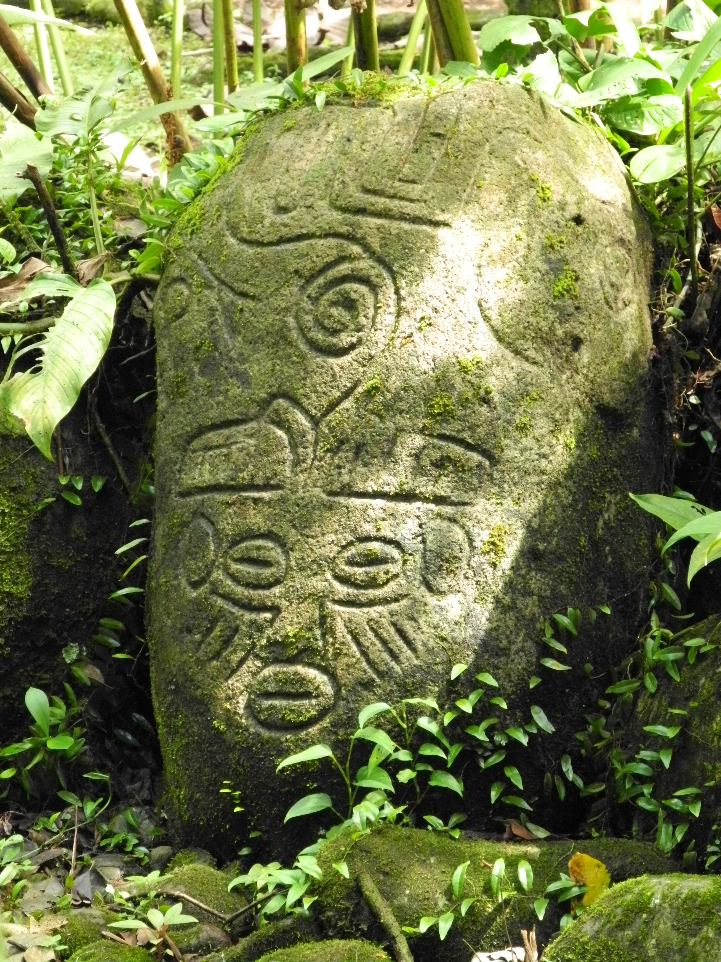 Petroglifo precolombino hallado en el sitio arqueológico Alma Ata, en Sarapiquí, Costa Rica.